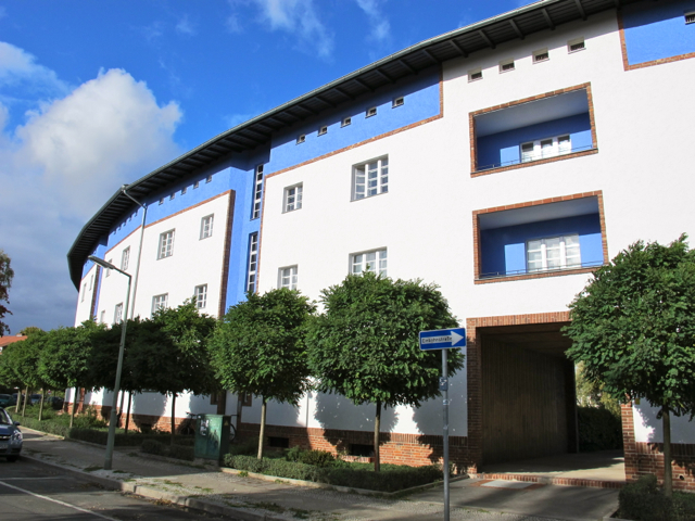 Hus i bostadsområdet Hufeisensiedlung i Berlin-Neukölln (Britz)